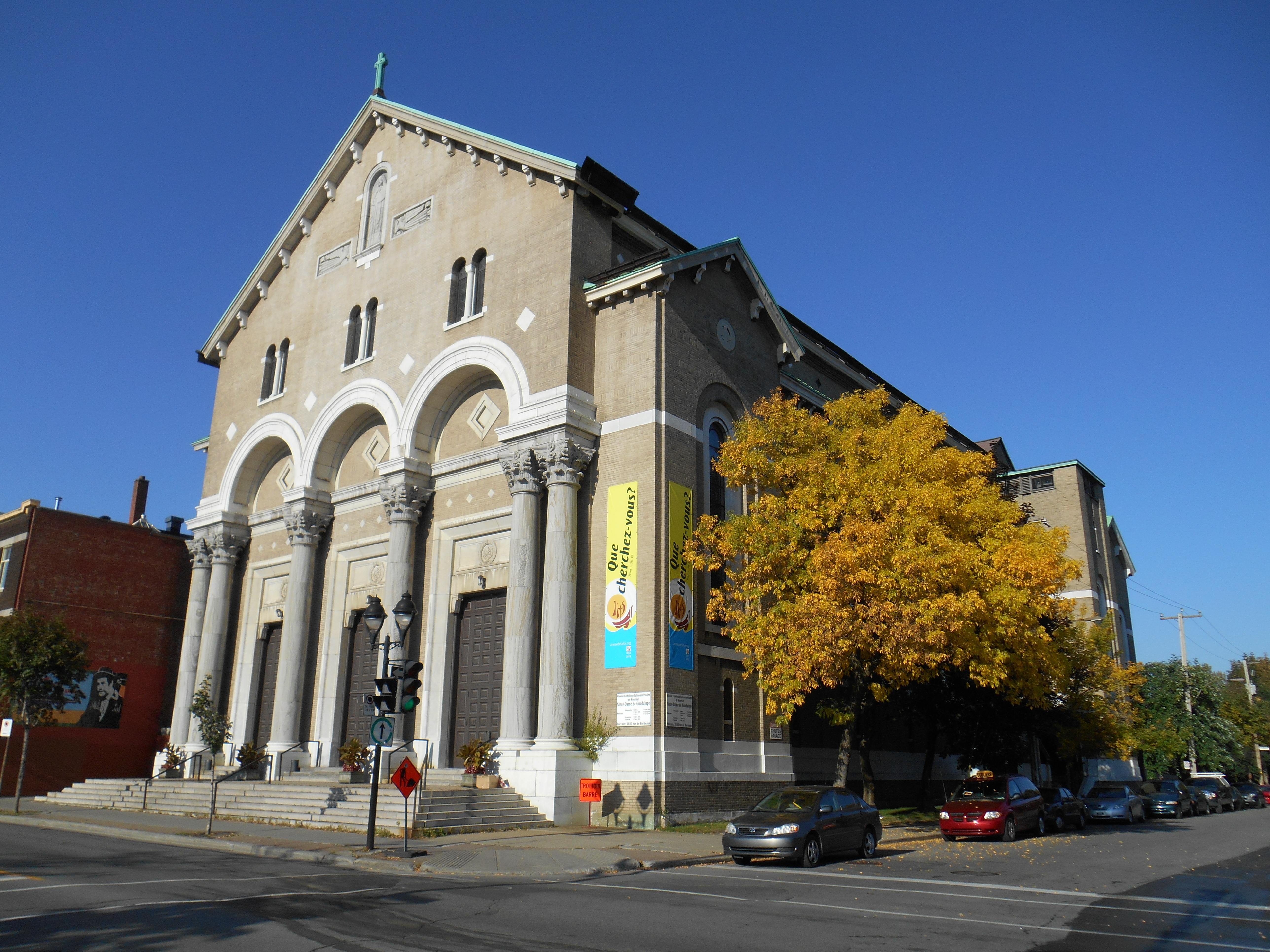 Église Notre-Dame-de-Guadalupe, 1969, rue Ontario Est, Montréal